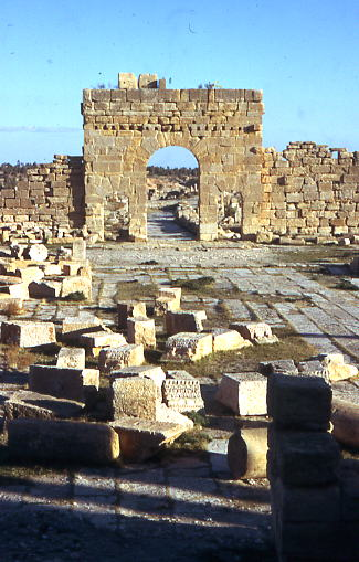 Ruines romaines de Madaure (Algérie)